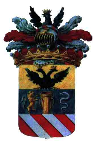 Familienwappen Brentano, Ehrenbreitstein